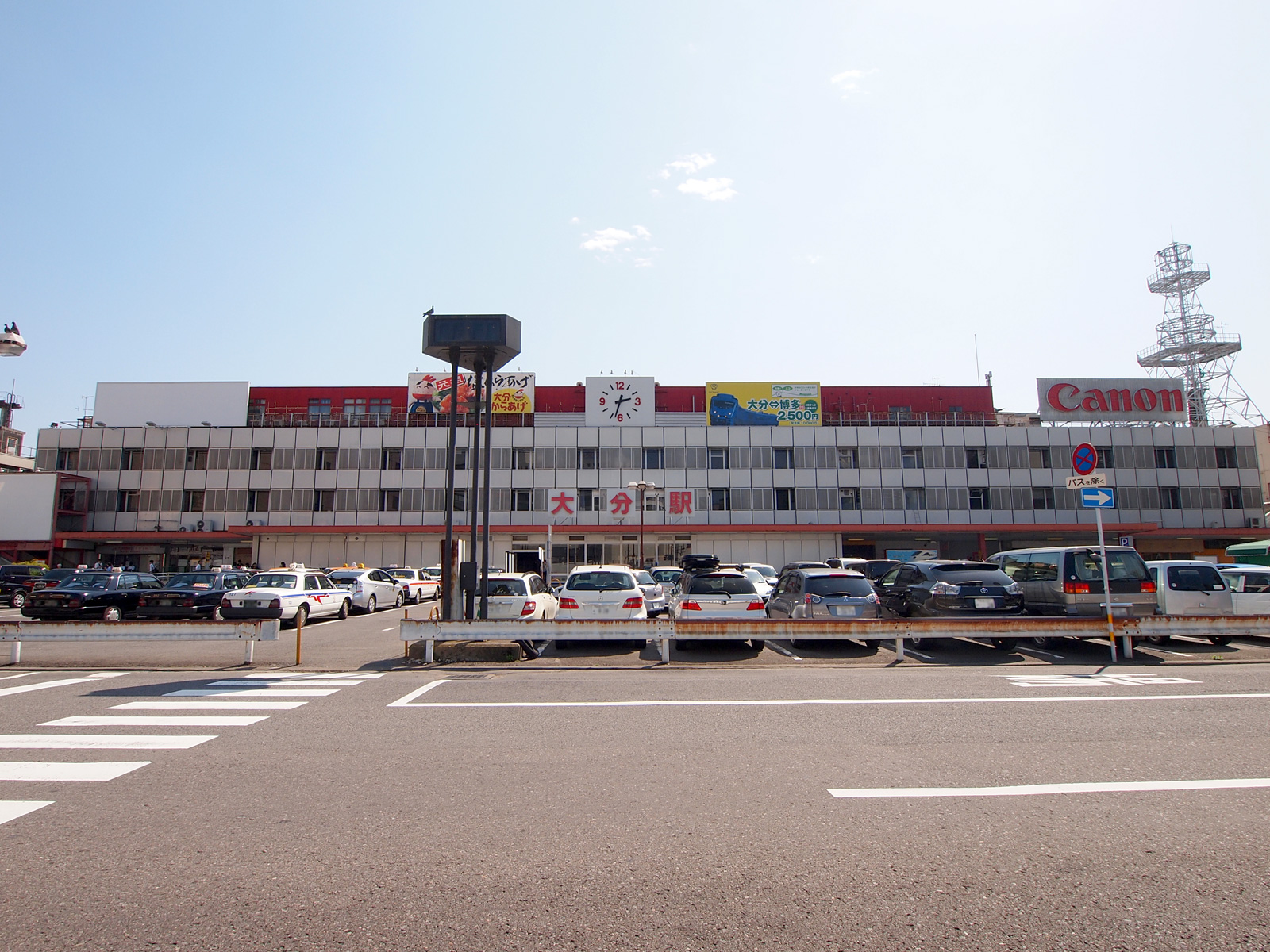 JR大分駅府内中央口（大分県大分市）